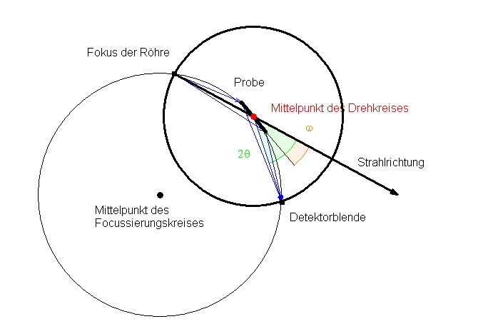 Prinzip der Parafokussierung in der Kristallographie